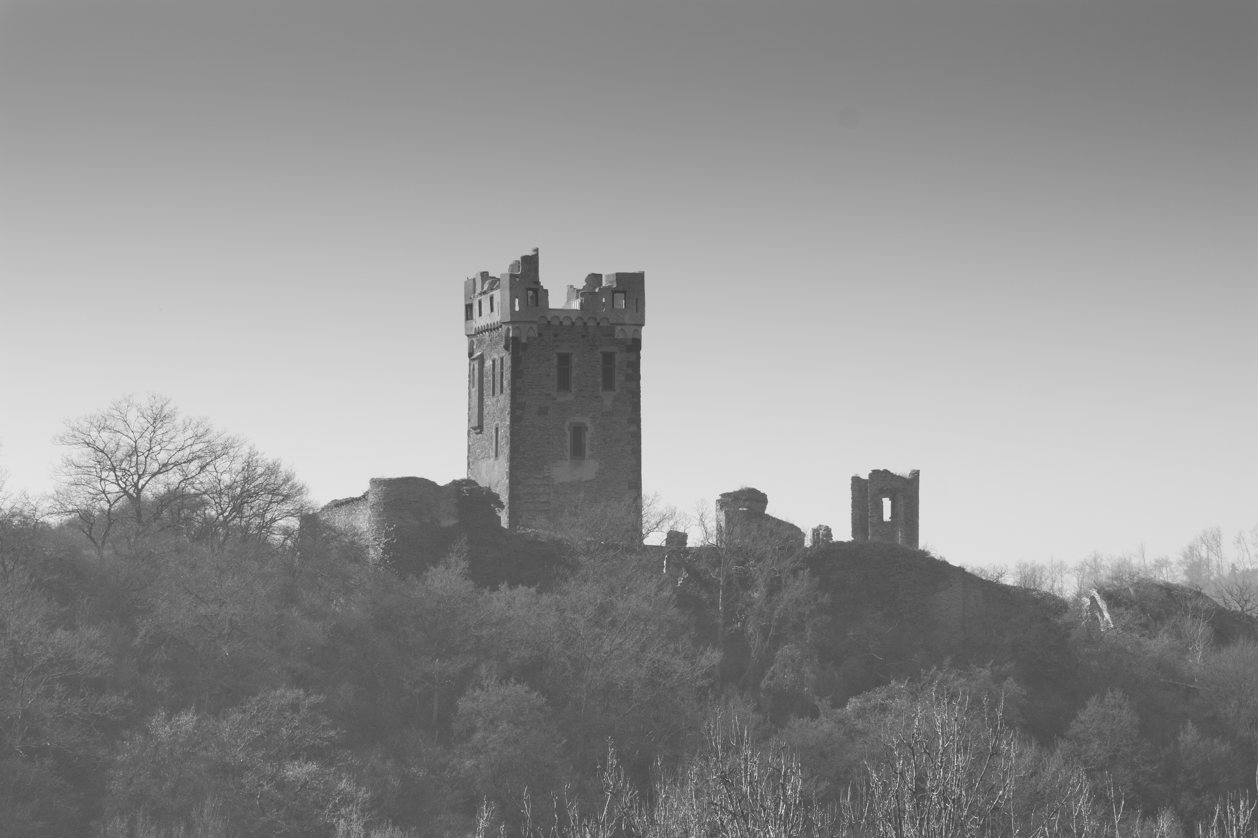 Blick auf die Ruine der Burg Wernerseck von höhergelegenen Feldern aus Richtung des Industriegebiets bei Plaidt.